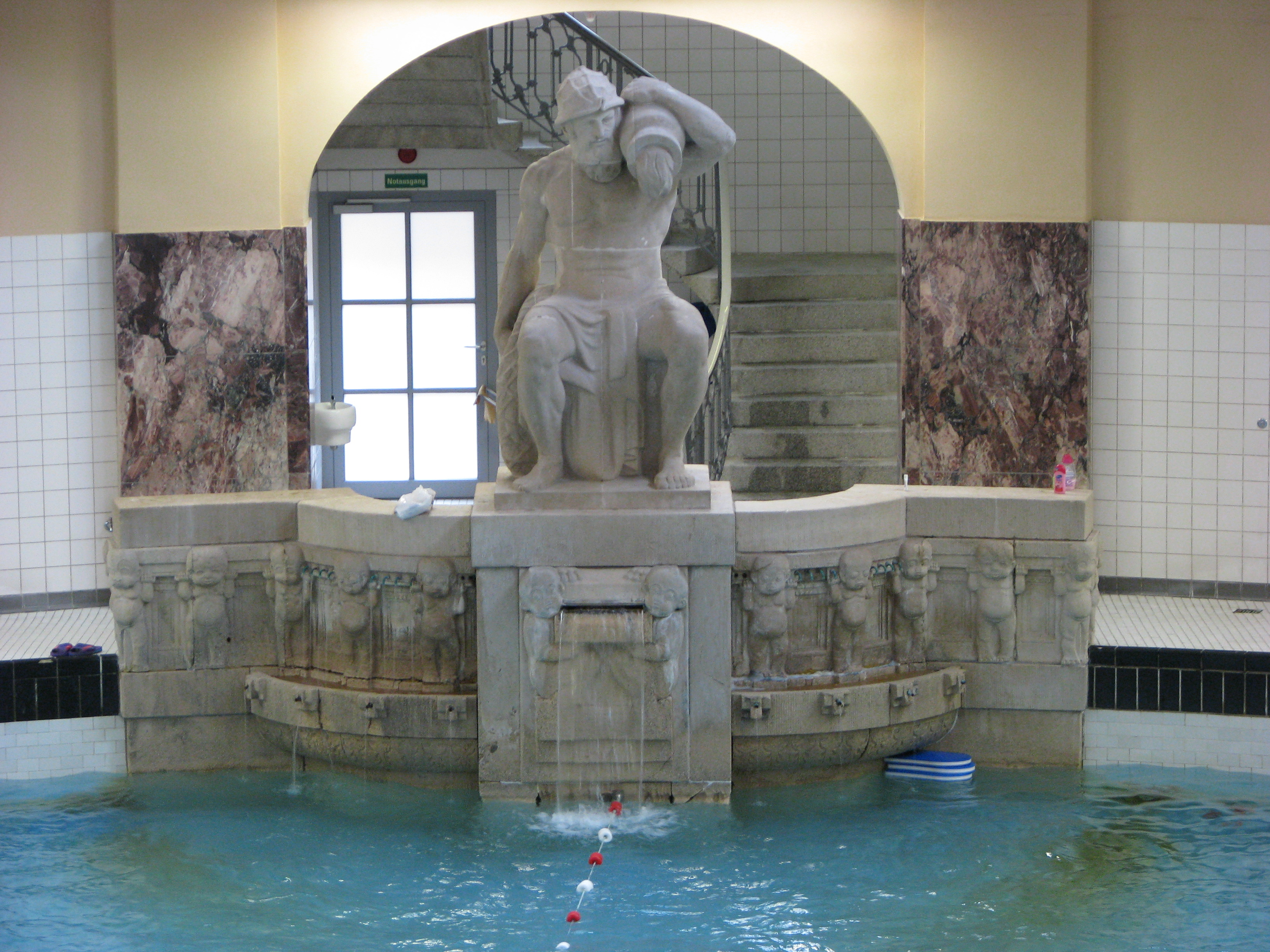 Aachen, Elisabethhalle - Neptunbrunnen von Prof. Carl Burger / Karl Burger